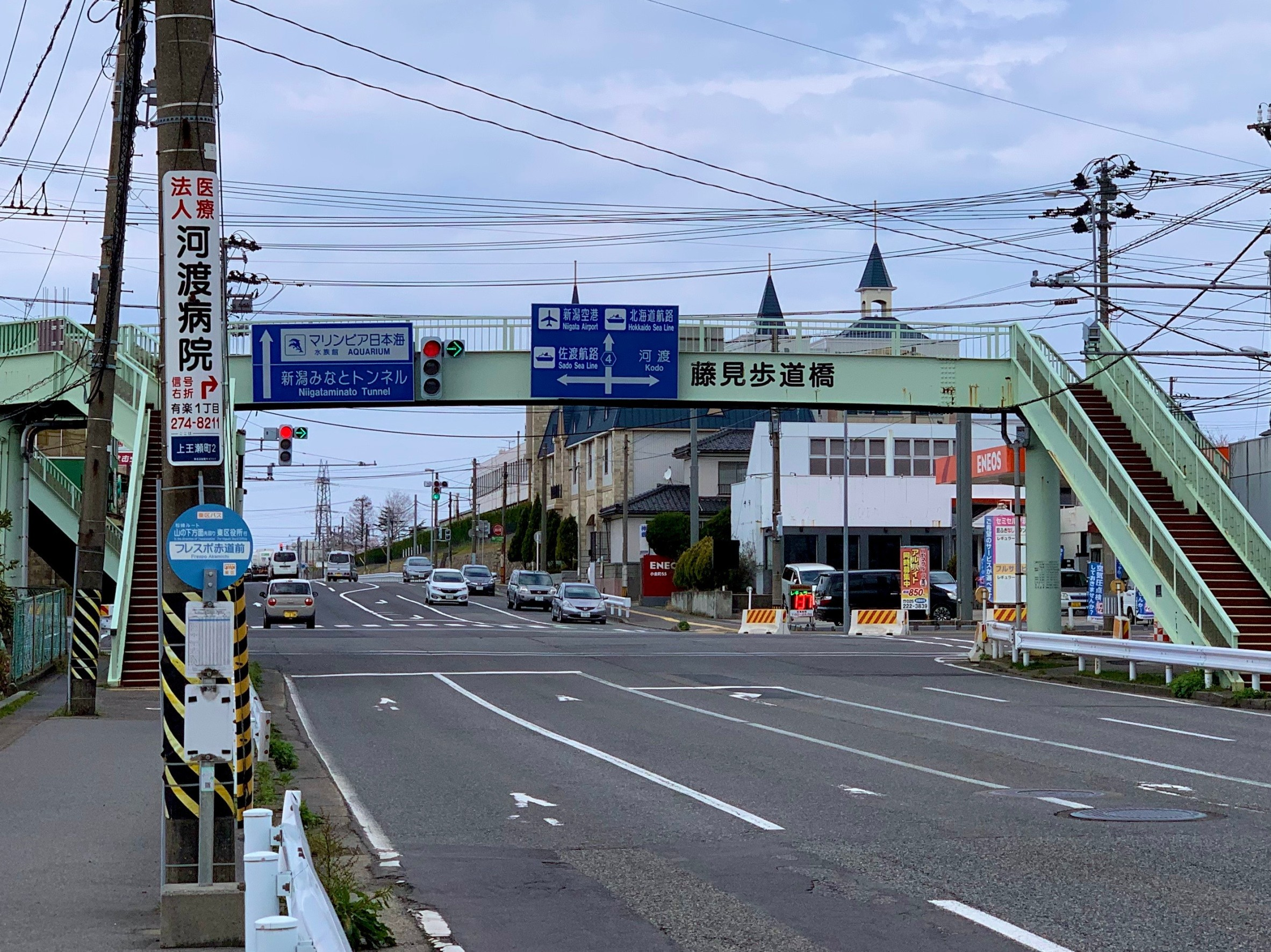 新潟県道4号新潟港横越線 藤見町付近（新潟市東区，2020年4月）